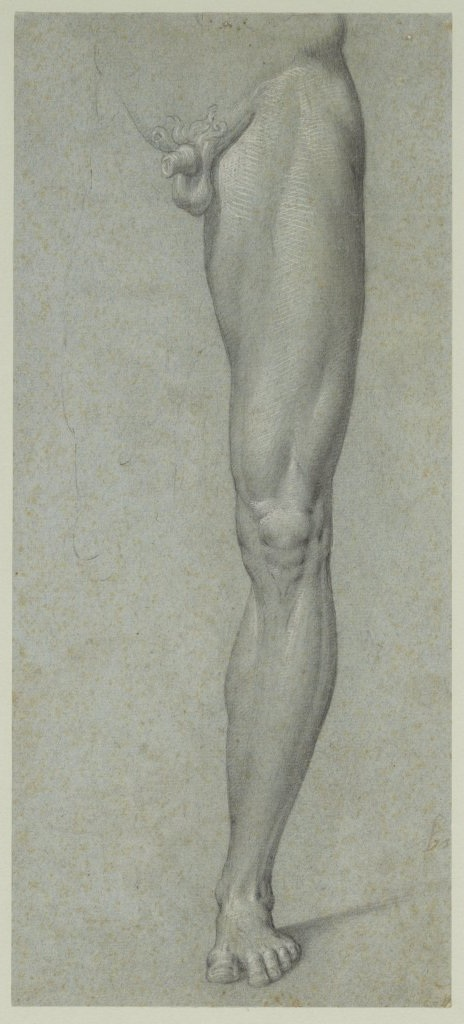 Attribué à Giovanni Ambrogio Figino (1548-1608) Étude de la jambe d’un homme Pierre noire et rehauts de gouache blanche - 29,2 × 23 cm Paris, Fondation Custodia Photo : Paris, Fondation Custodia